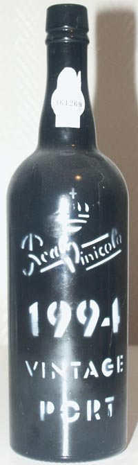 eigen foto